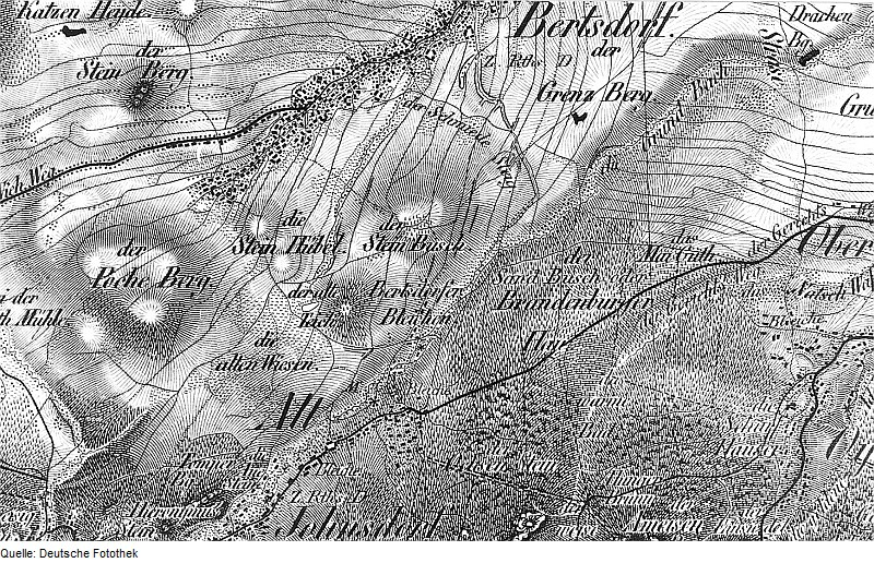 Original image description from the Deutsche Fotothek Bertsdorf-Hörnitz-Bertsdorf. Oberreit, Sect. Zittau, 1844/46